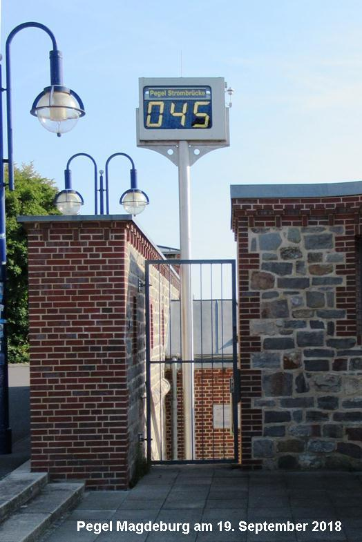 Elbepegel Magdeburg mit historischem Tiefpunkt am 19. September 2018